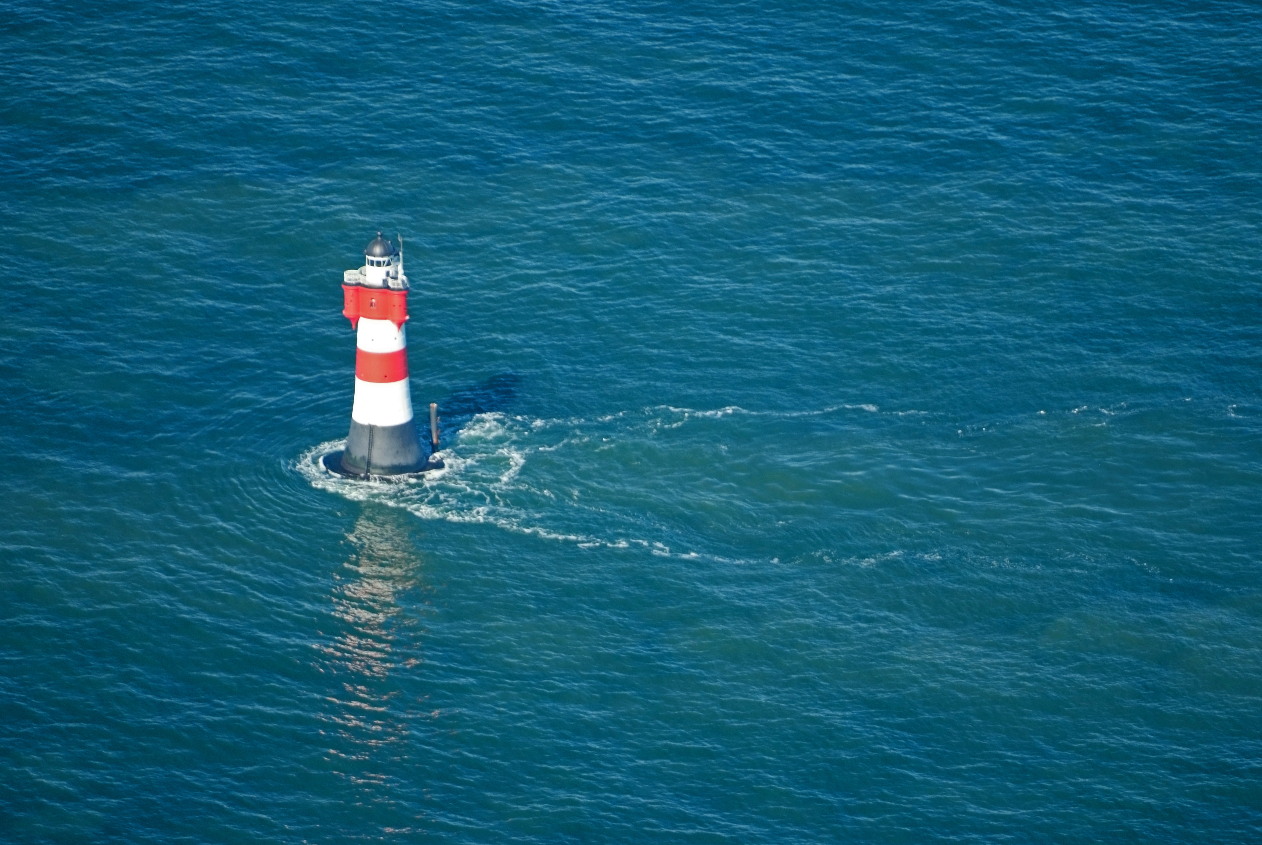 Fotoflug vom Flugplatz Nordholz-Spieka über Bremerhaven, Wilhelmshaven und die Ostfriesischen Inseln bis Borkum Leuchtturm Roter Sand Location: 53°46'48.77"N,8°10'58.91"E